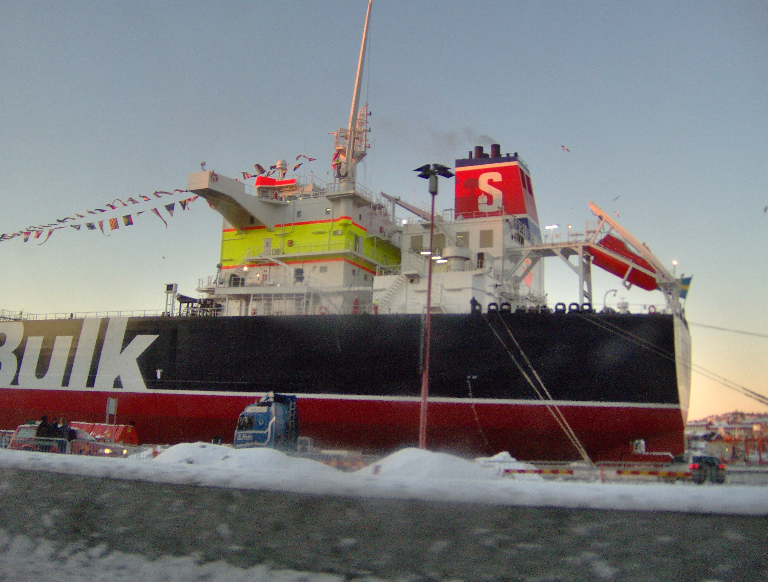 Stena Arctica 2